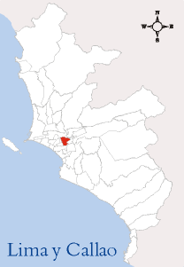 Localización del Distrito de La Victoria Imagen elaborada por --Edgardo Reyes 21:18 9 mar, 2005 (CET) Categoría:Mapas del Perú (imagen)